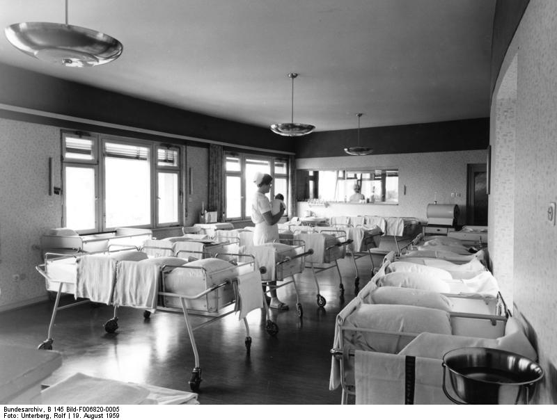 Städt. Krankenanstalten -Frauenklinik- Darmstadt Blick in den Säuglingsraum